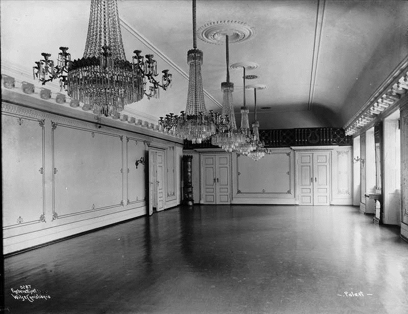 Ballsalen i Paléet